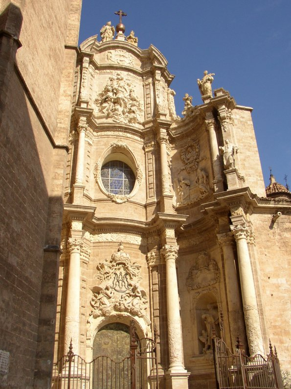 Valencia (Comunidad Valenciana), España. Valencia. Catedral (portada barroca). Fotografía realizada el 11 febrero de 2003 por el autor Usuario. Pelayo2.